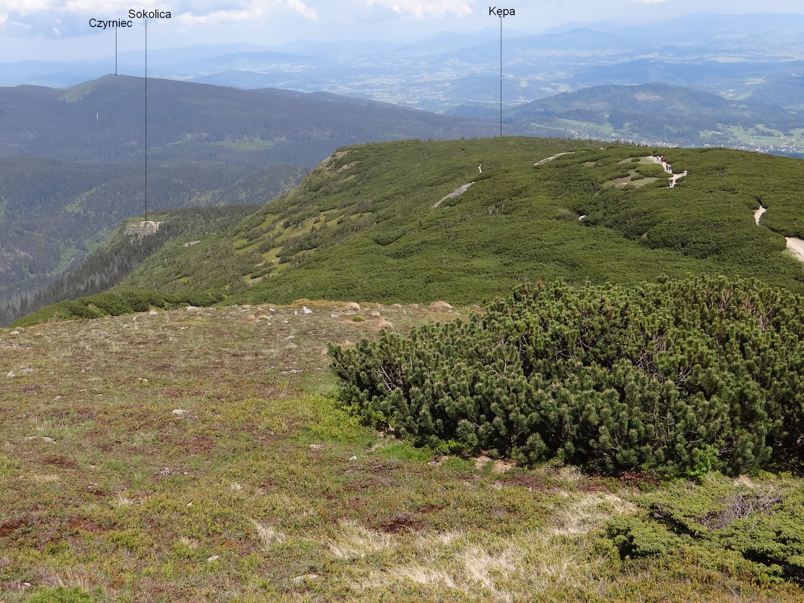 Widok z Gówniaka